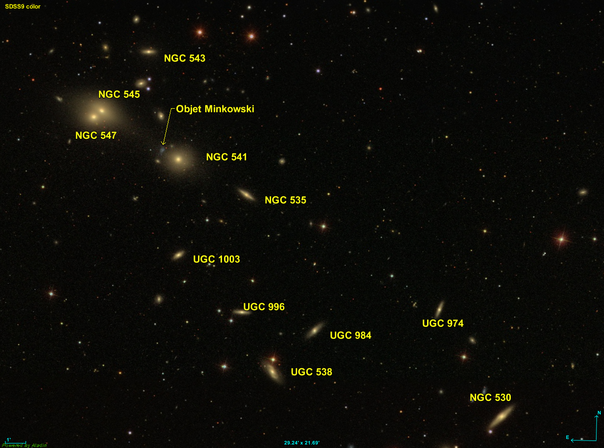 Image créée à l'aide du logiciel Aladin Sky Atlas du Centre de Données astronomiques de Strasbourg et des données publiques en format FIT de SDSS (Sloan Digital Sky Survey).